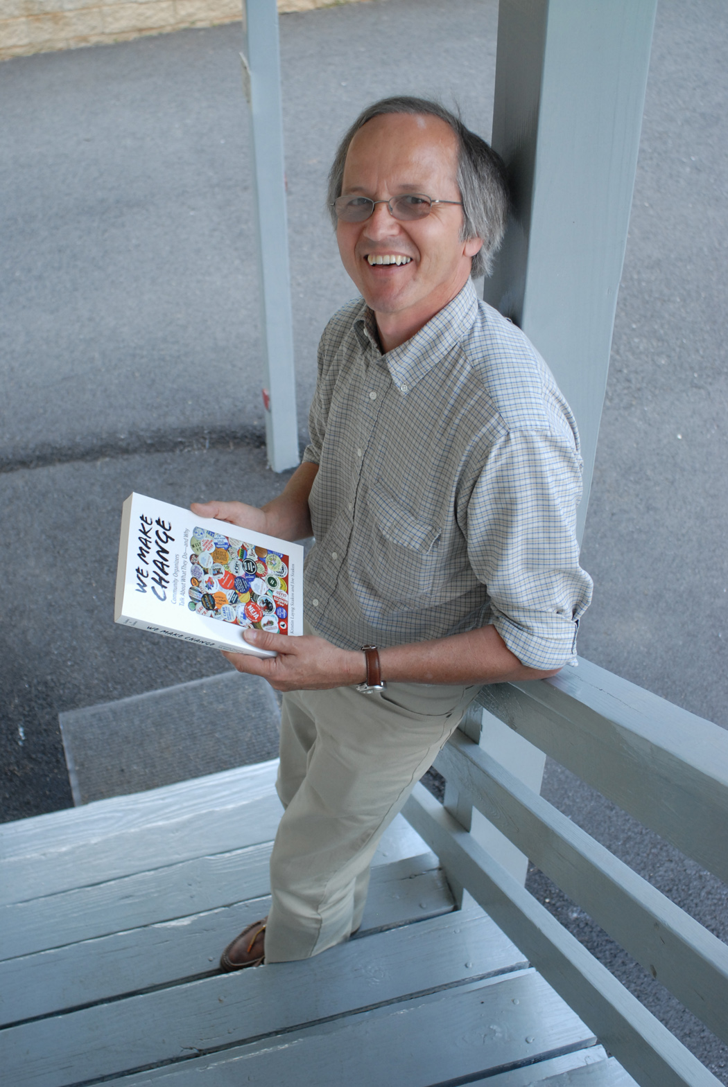 photograph of Joe Szakos